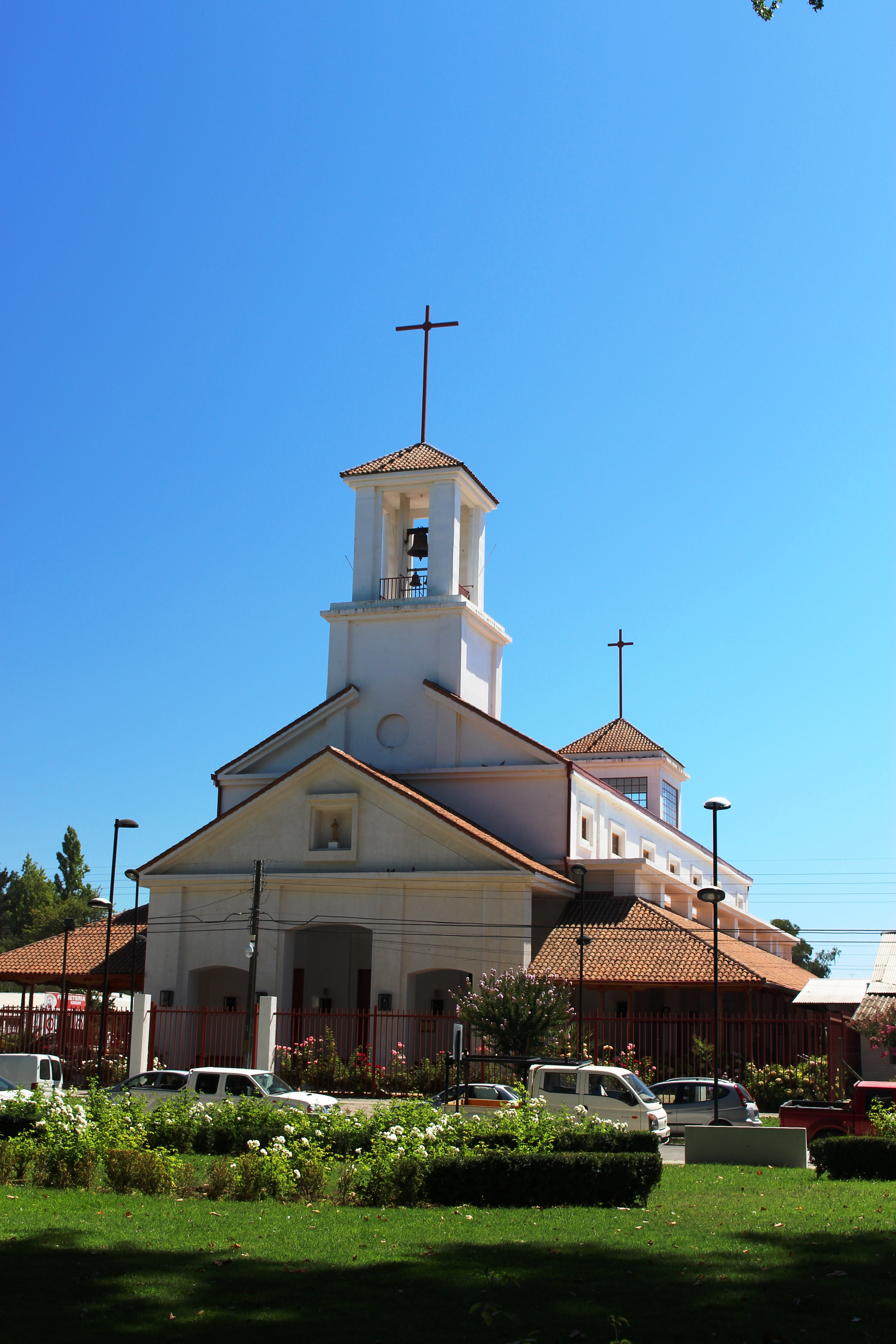 Frontis Parroquia San Francisco Javier, comuna Peralillo, Chile